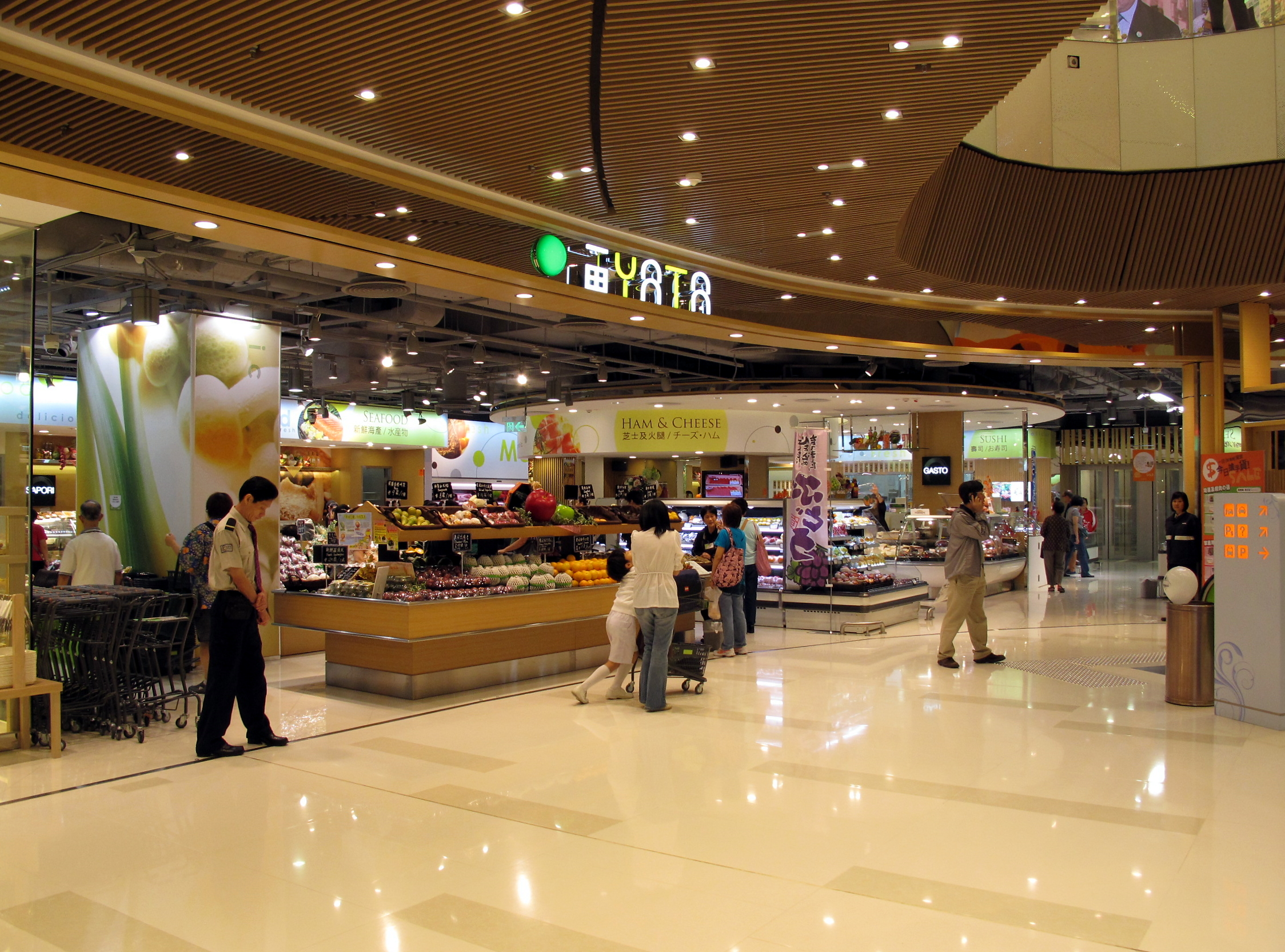 Yata Supermarket in Mikiki Mall